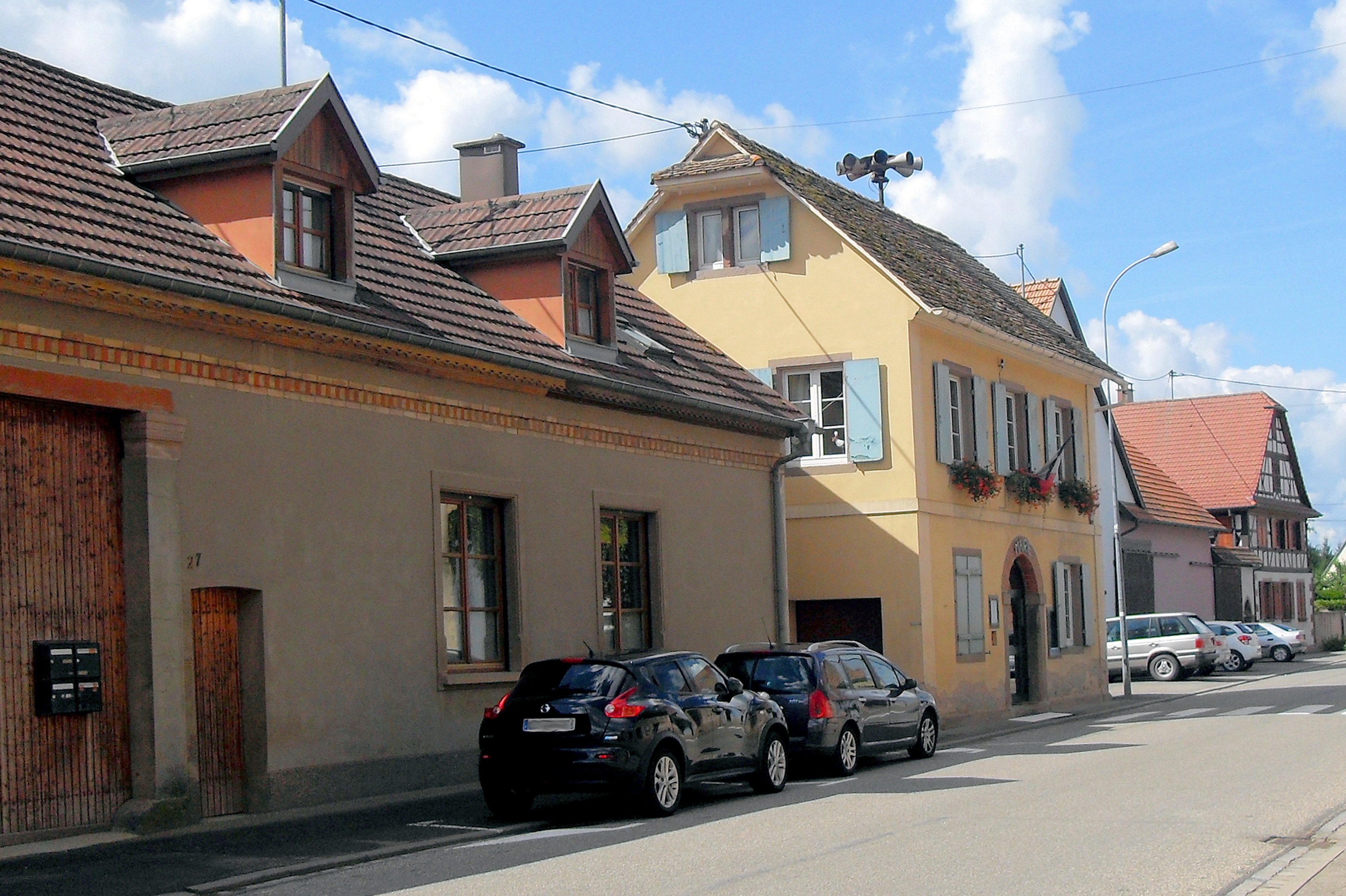 La mairie de Mittelschaeffolsheim